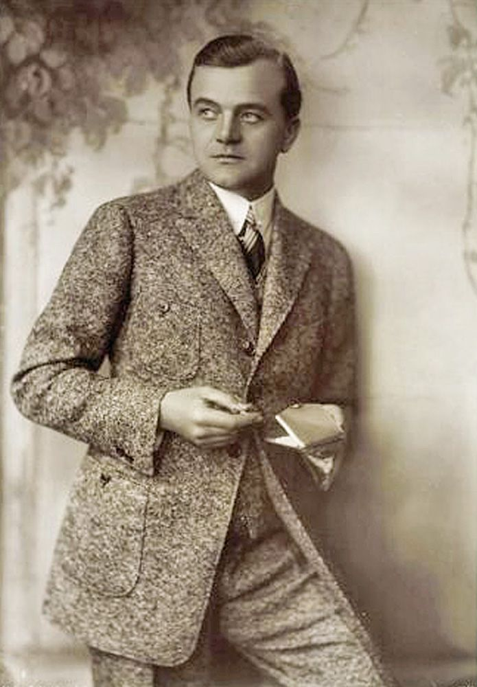 Werner Funcke zu Beginn der 1920er Jahre This image is a movie star postcard published by Ross Verlag in Berlin. This is image nr. 437/2 from their series. It was published ca. 1919–1924. This tag does not indicate the copyright status of the attached work. A normal copyright tag is still required. See Commons:Licensing for more information. In particular, Ross images are in the public domain in Germany only if it can be shown that the photographer (usually mentioned on the image itself) has died more than 70 years ago. Ross images that are in the public domain in Germany may still be copyrighted in the United States if they were first published later than 1924 and were still copyrighted in Germany on January 1, 1996 (i.e. if the photographer died in 1926 or later).